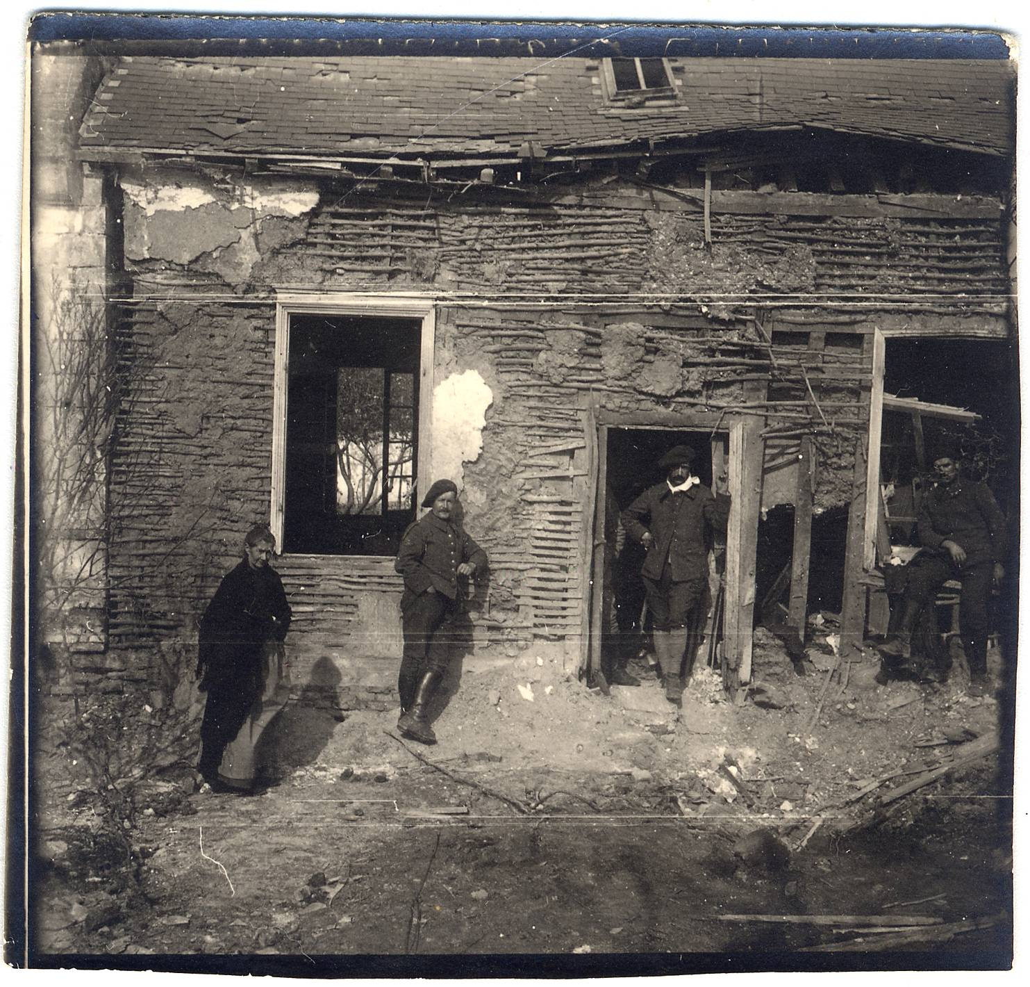 Vue du du presbytère de Grattepanche (Somme) en partie détruit par une bombe d'avion. Entre 1914 et1918. Guerre 1914-1918. Des soldats posent devant le presbytère.